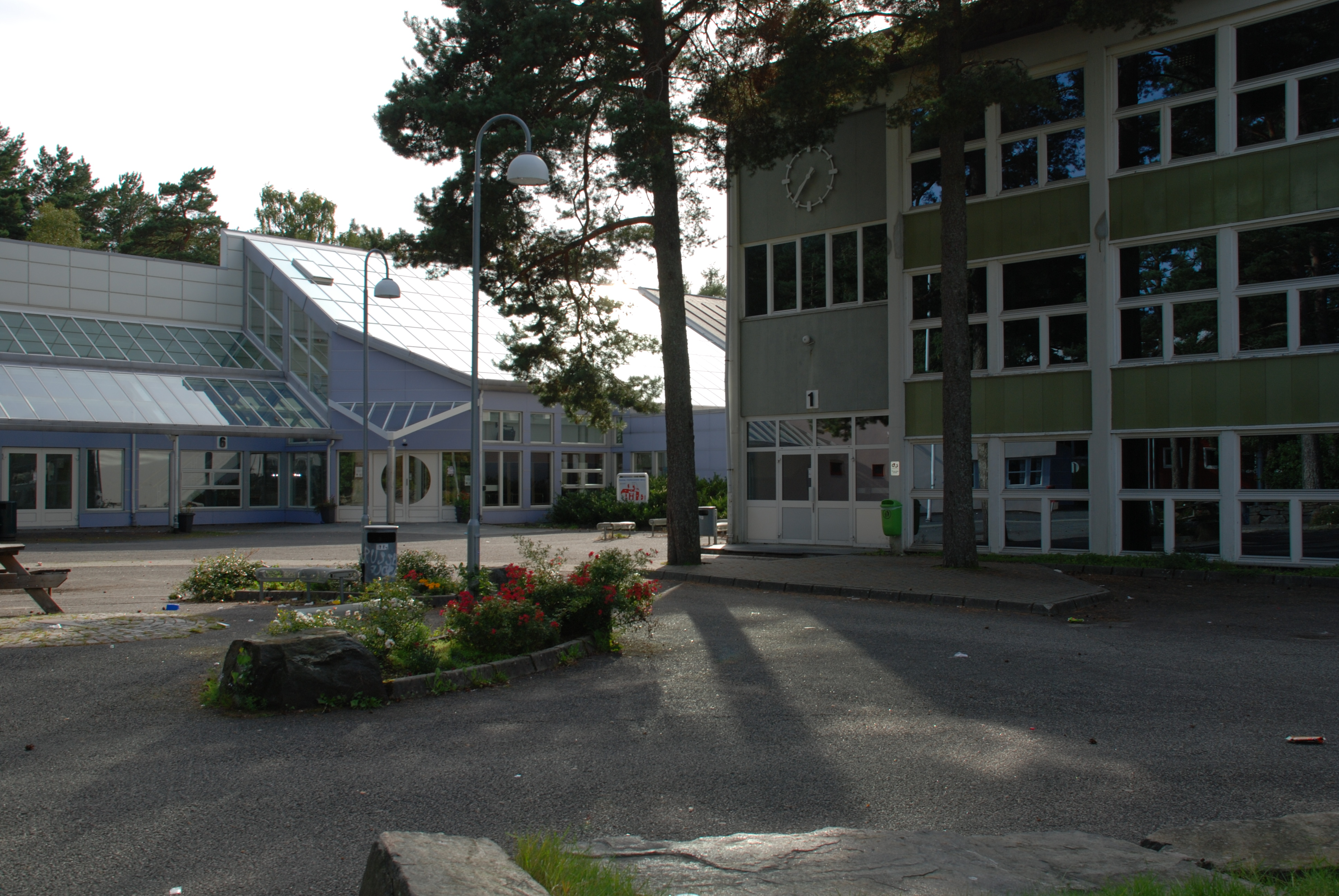 Mandal Videregående skole. Dekker kommunene Mandal, Lindesnes, Audnedal og Marnardal i Vest-Agder.